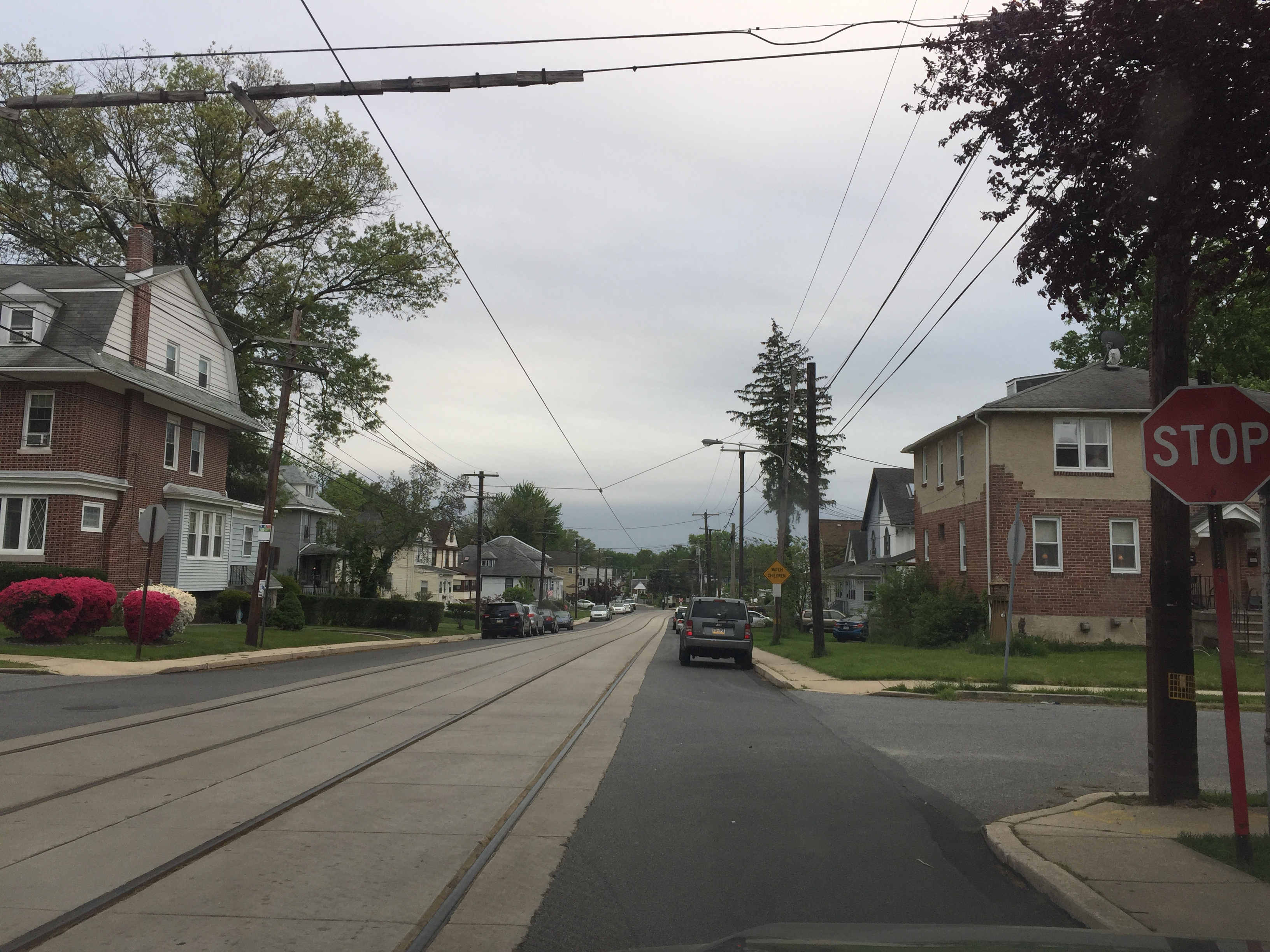 Magnolia station